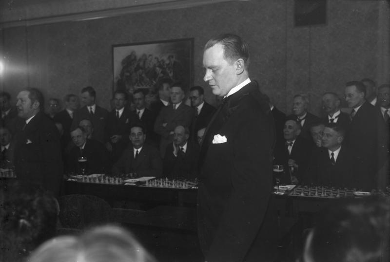 Schachweltmeister Dr. Alechin spielt in Berlin! Der berühmte Schachweltmeister Dr. Alechin beim Simultan-Spiel in Berlin.